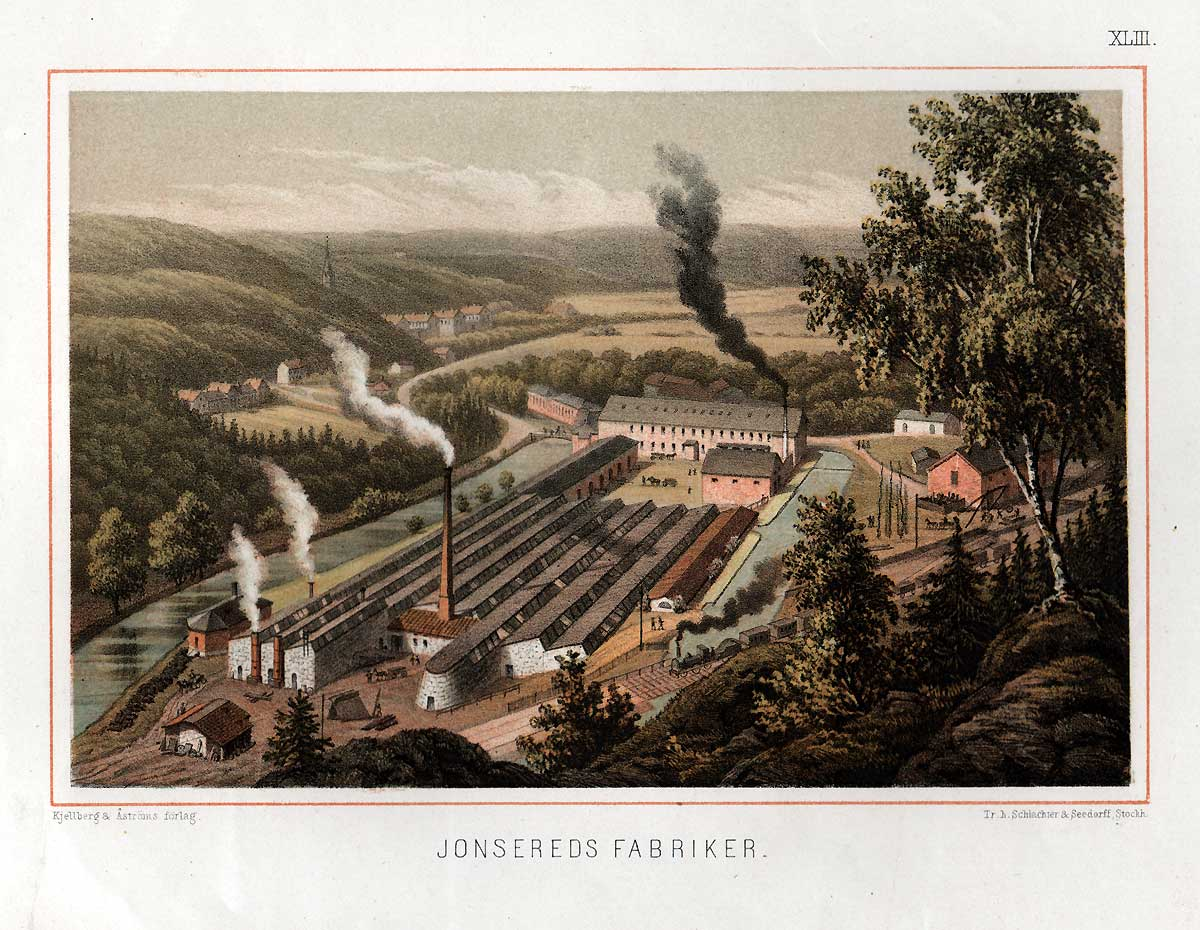 Jonsereds fabriker, Västergötland, Sweden